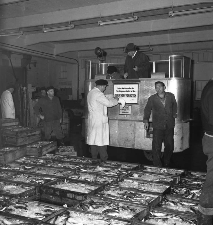 Bremerhaven: Fischereihafen, Auktion in Halle XV